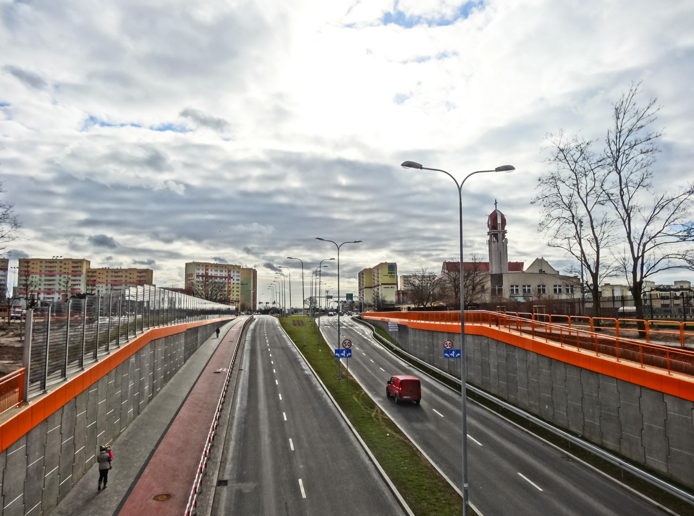 Trasa Uniwersytecka w Bydgoszczy